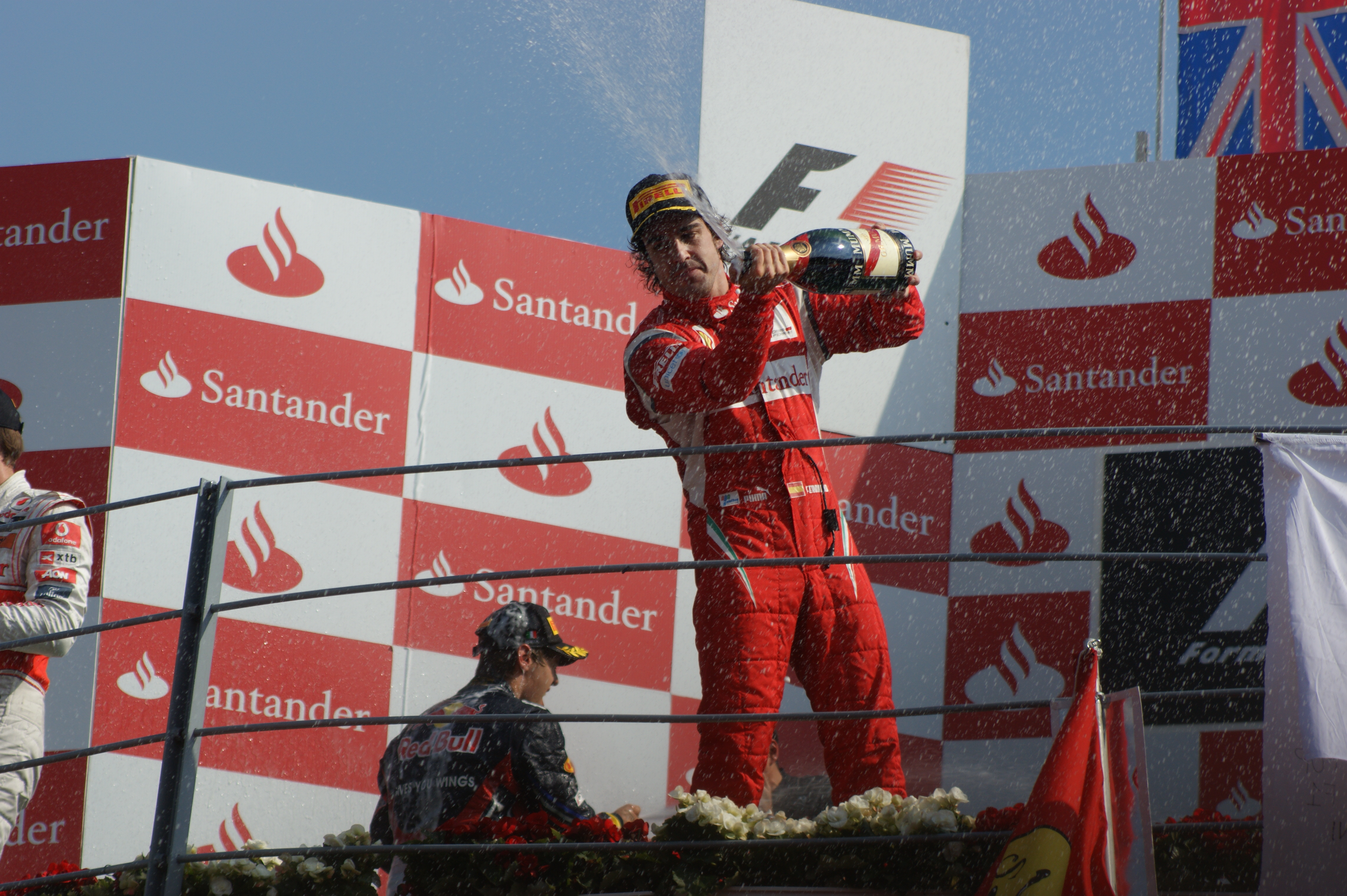 Fernando Alonso sul podio di Monza 2011 visto dalla pista